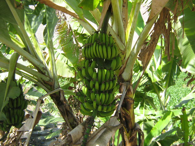 Plátanos o bananos de la región Ancash en Perú.